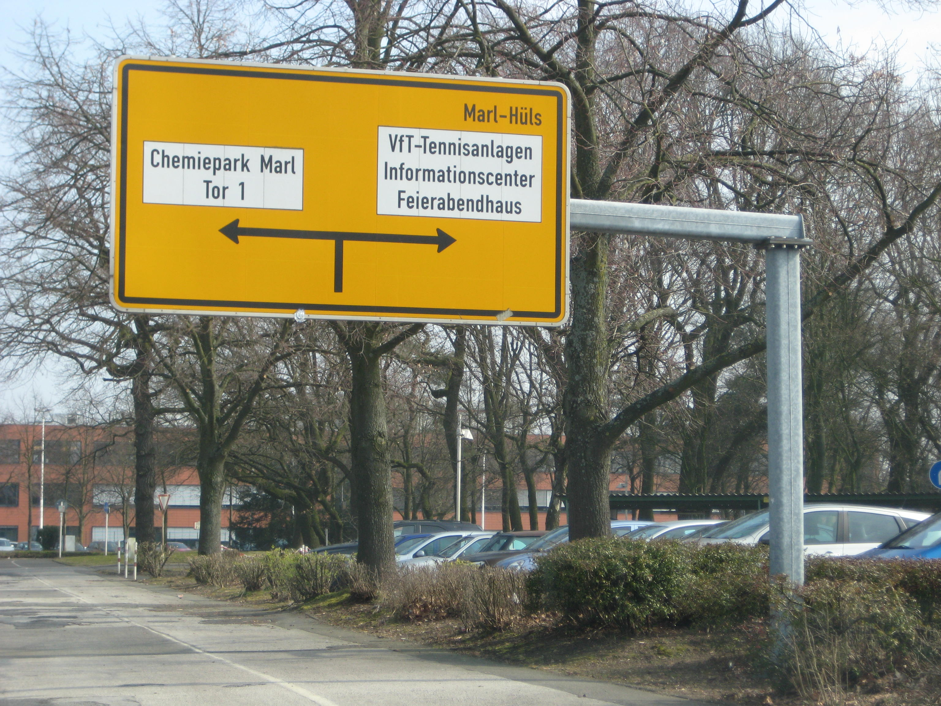 Schilderbrücke / Kragarm neben einer innenstädtischen Autostraße über einem Fußweg (Paul-Baumann-Straße, Marl)